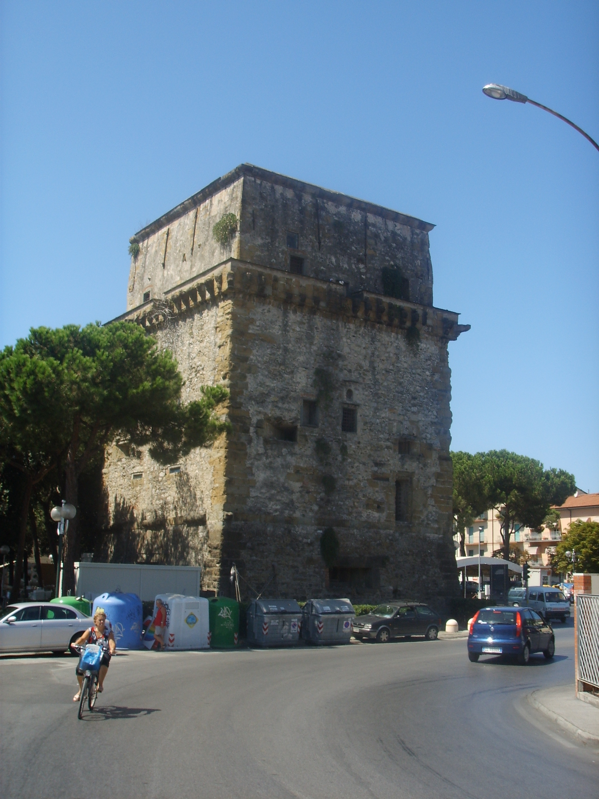 Viareggio, torre_matilde in Viareggio, italy